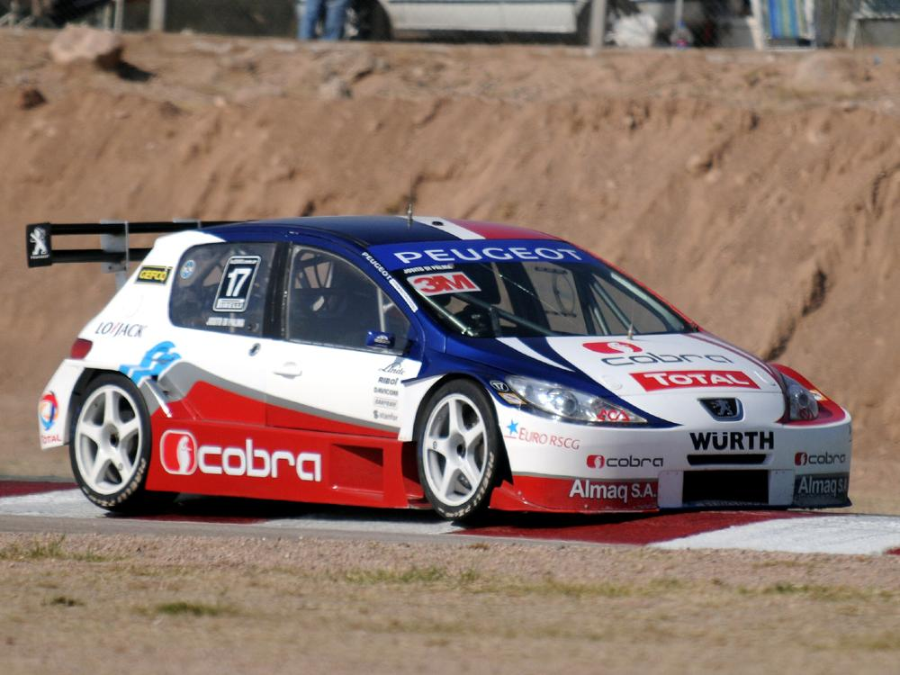 Peugeot 307 hatchback del equipo Cobra Team de TC 2000